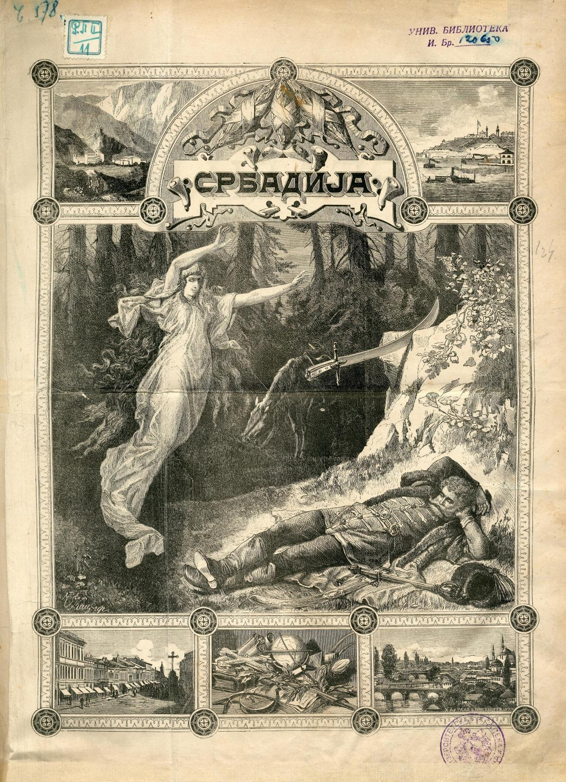 Србадија. Илустрован лист за забаву и поуку, ур. Стеван Ћурчић, Беч 1874—1877.